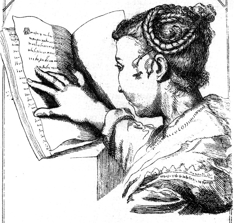 Tuschezeichnung "Lesende Frau".